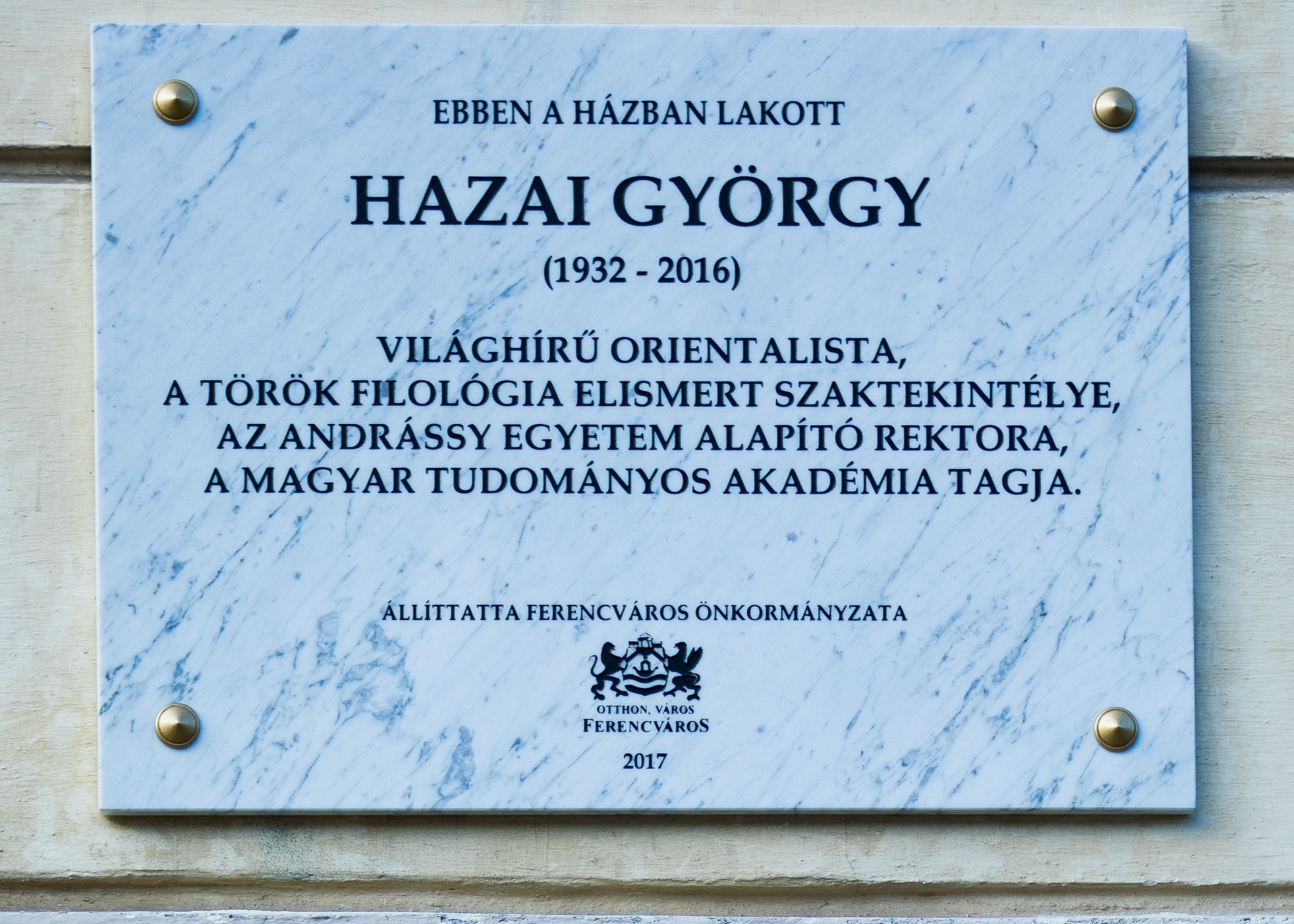 Hazai György magyar turkológus, orientalista emléktáblája a Közraktár u. 12/a.) szám alatt